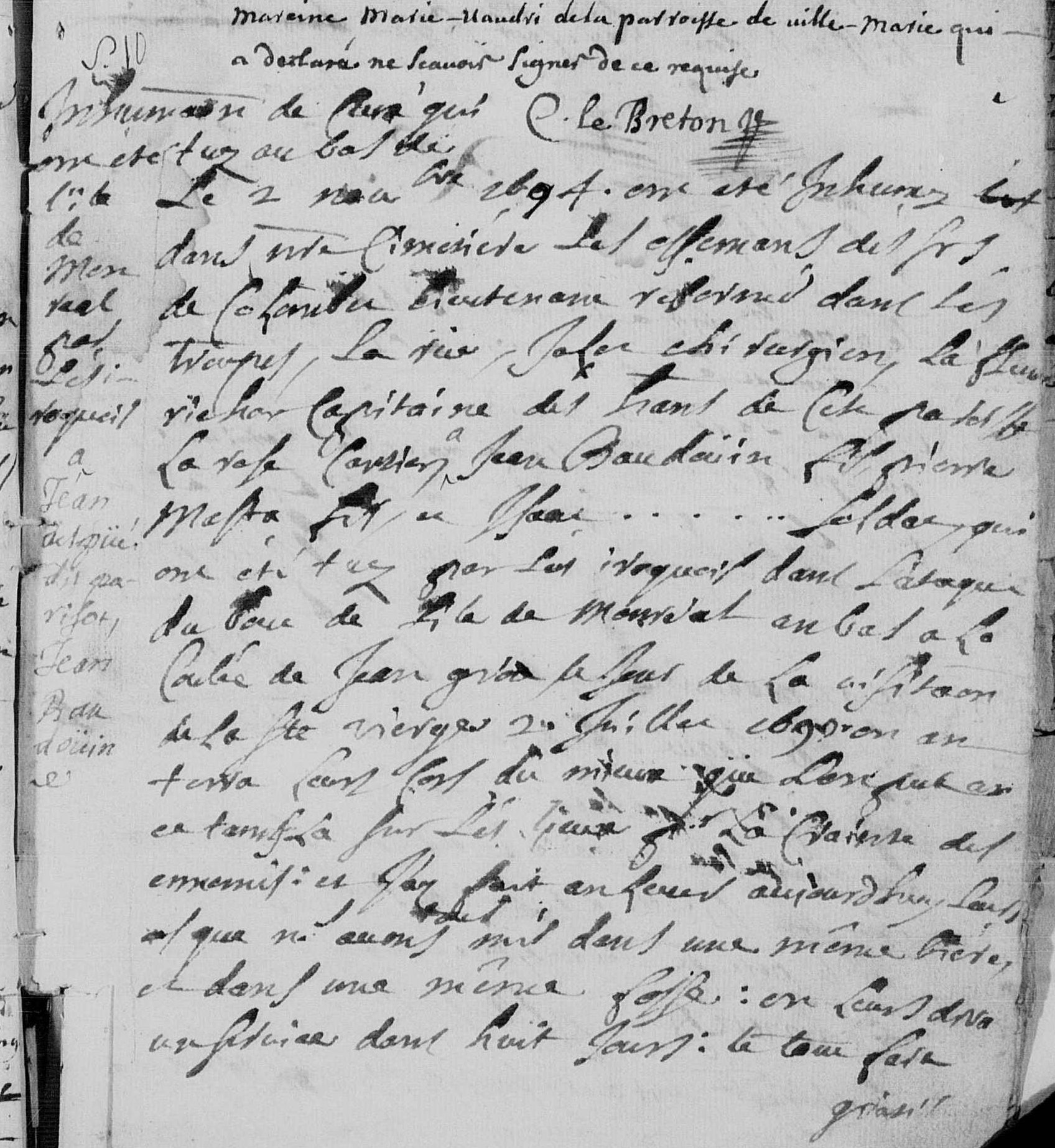 Extrait du registre de Pointe-aux-Trembles de 1694 où l'on fait mention de l'inhumation des hommes ayant ayant été tué lors de la bataille de la Coulée Grou